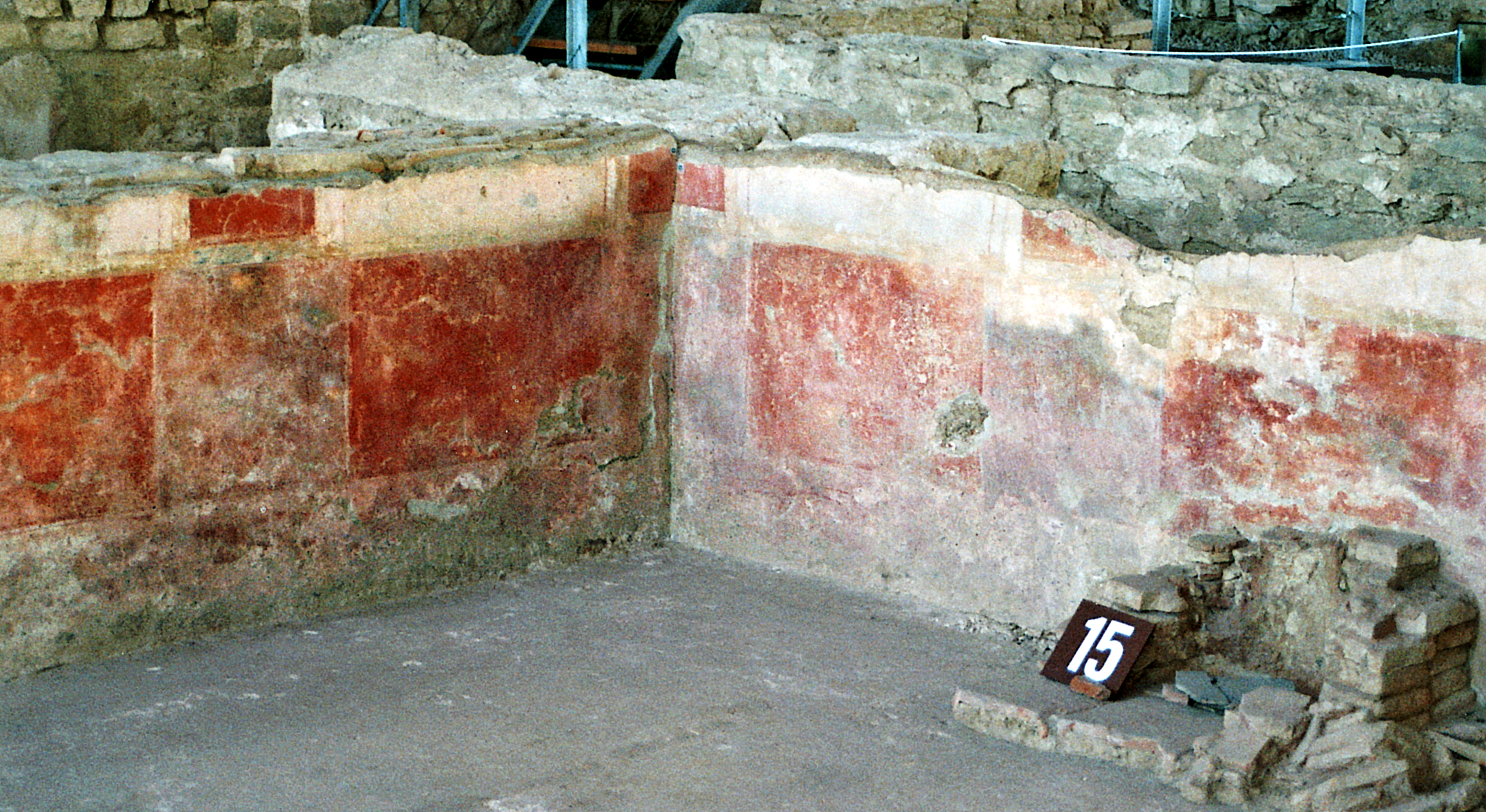 Villa Rustica Ahrweiler: Der ursprünglich in der Nordwestecke des Hauses II liegende Raum mit aufwendigem Dekorationssystem und Ofen (Nr. 15).